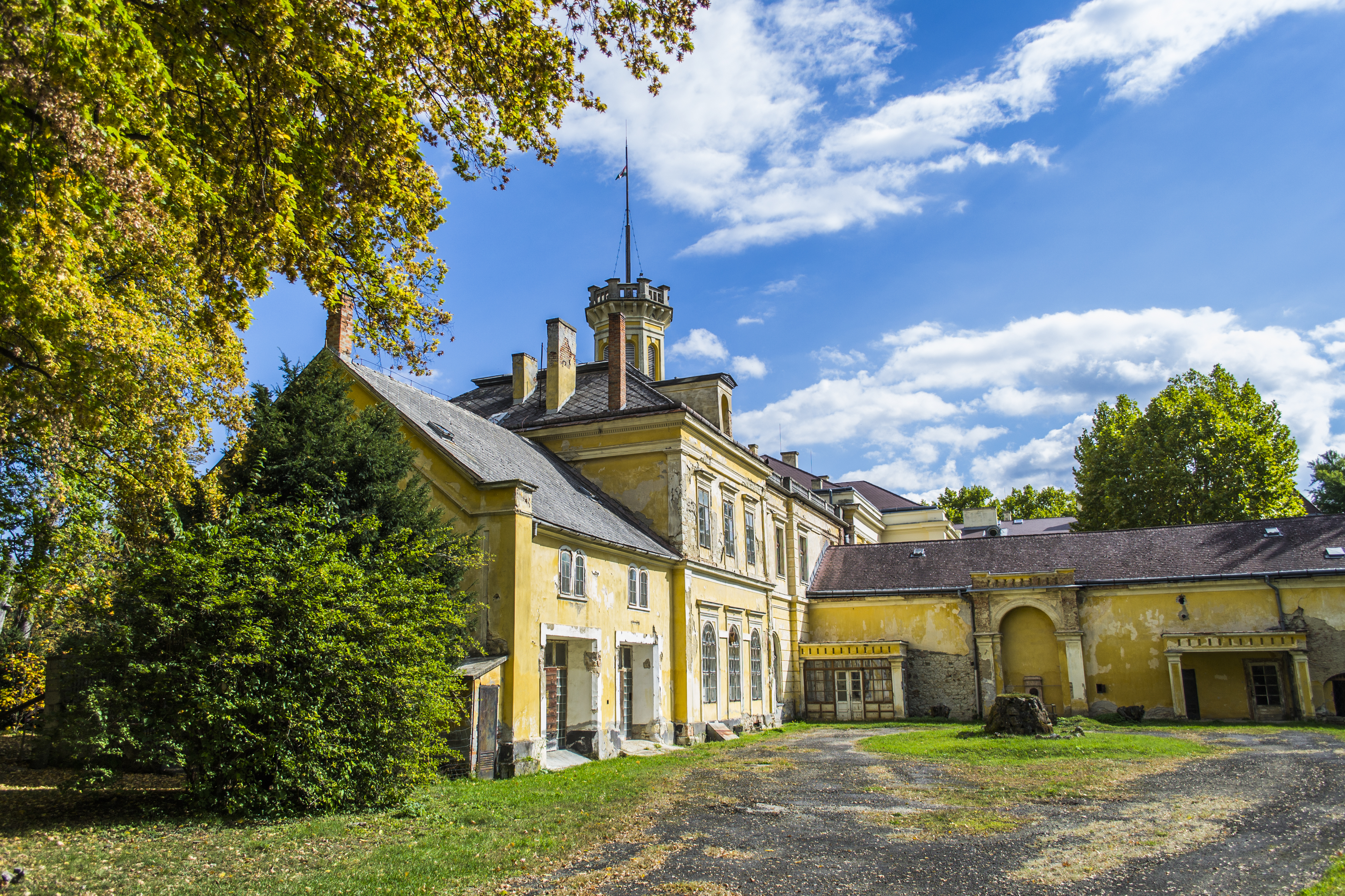 Károlyi-kastélyegyüttes és parkja This is a photo of a monument in Hungary. Identifier: 2768